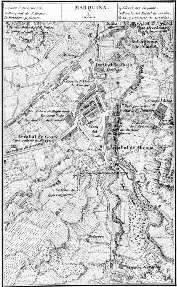 Markina 1857an, Francisco Coello.